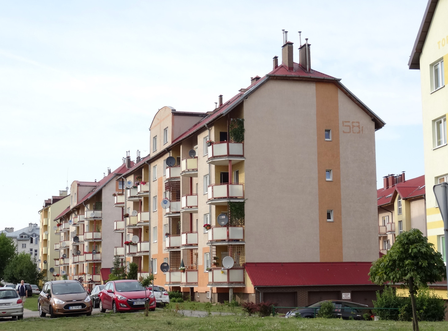 Osiedle Toruńskie w Solcu Kujawskim